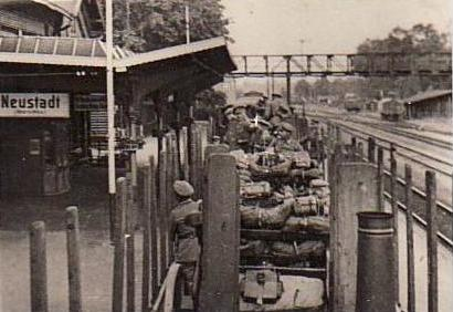 Lato 1939, pociąg z wojskiem (w tle konstrukcja kładki do peronu gogolińskiego).